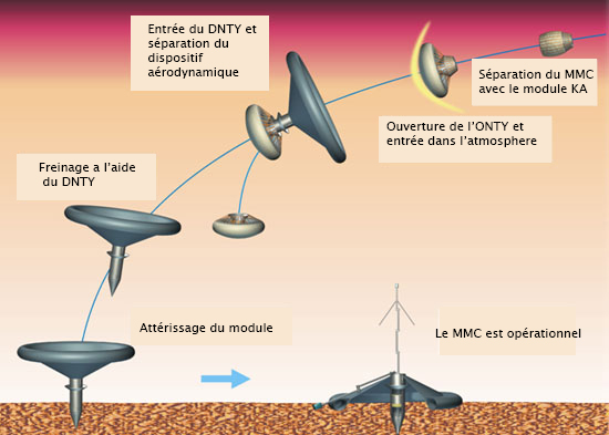 Metnet Landing Concept Fr